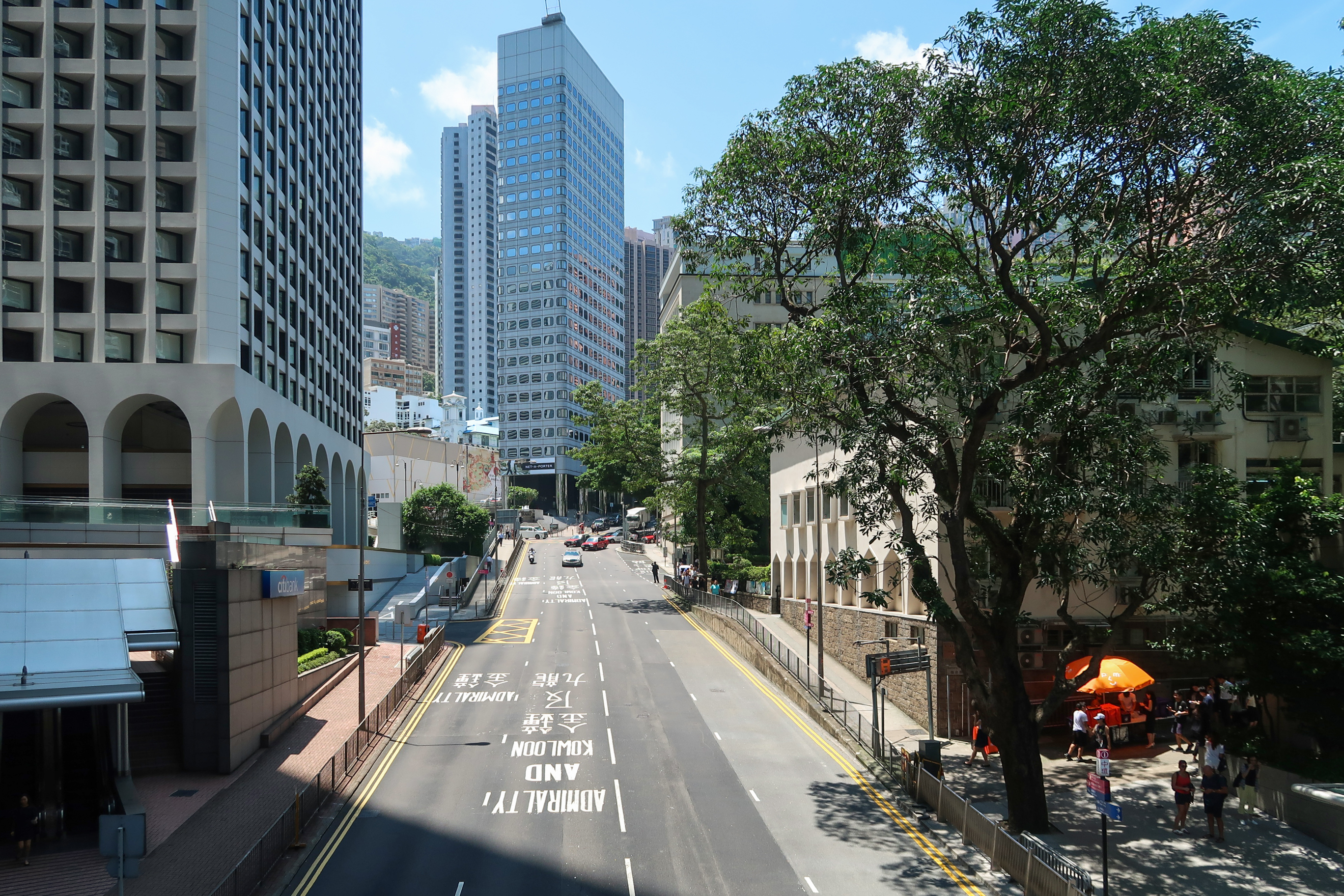 Garden Road